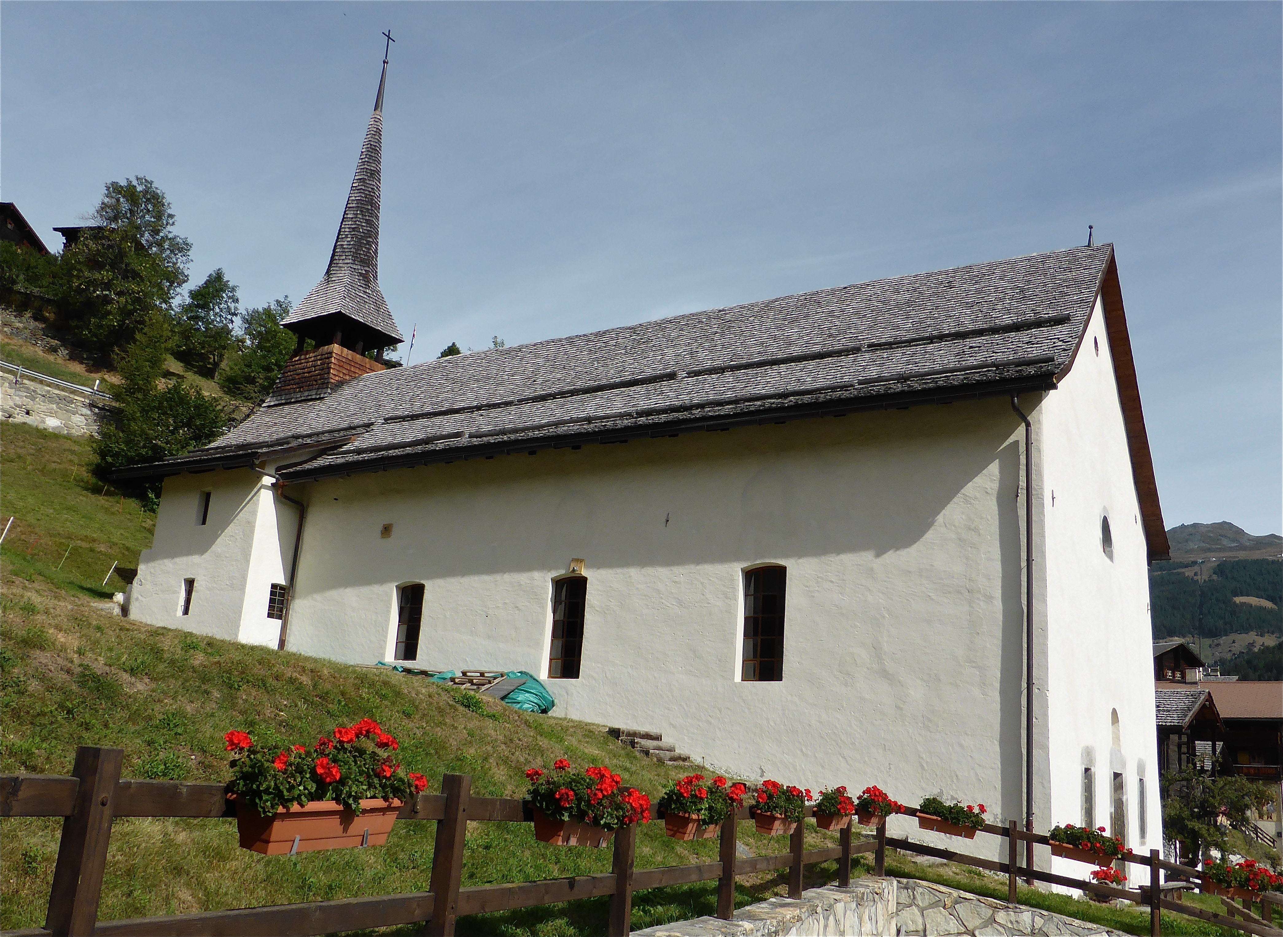 La chapelle de Saint-Jean en Anniviers